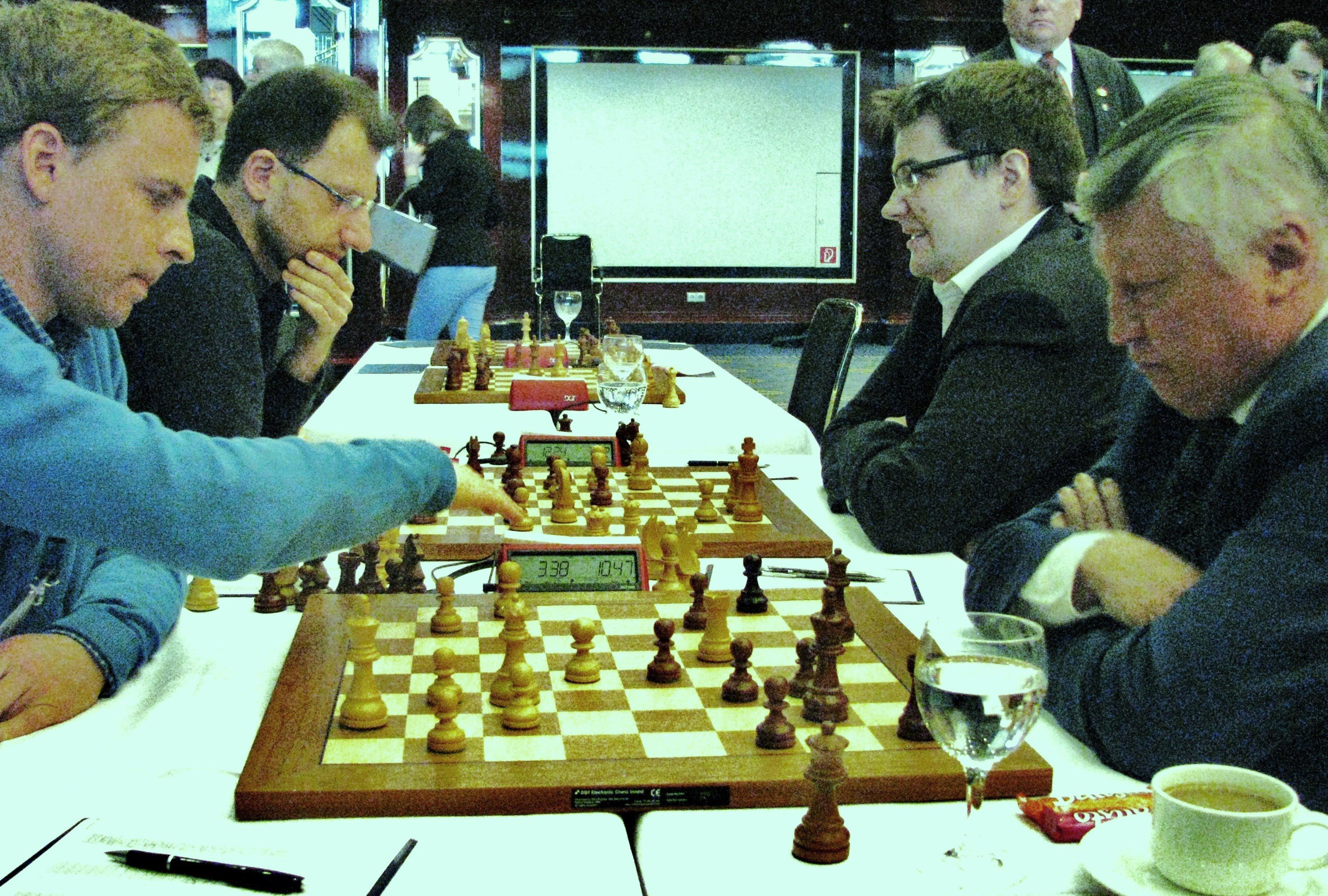 Von li.: Láznička, Tigran Gharamian, Evgeny Tomashevsky und Anatoli Karpov bei der Bundesliga-Finalrunde 2017 in Berlin